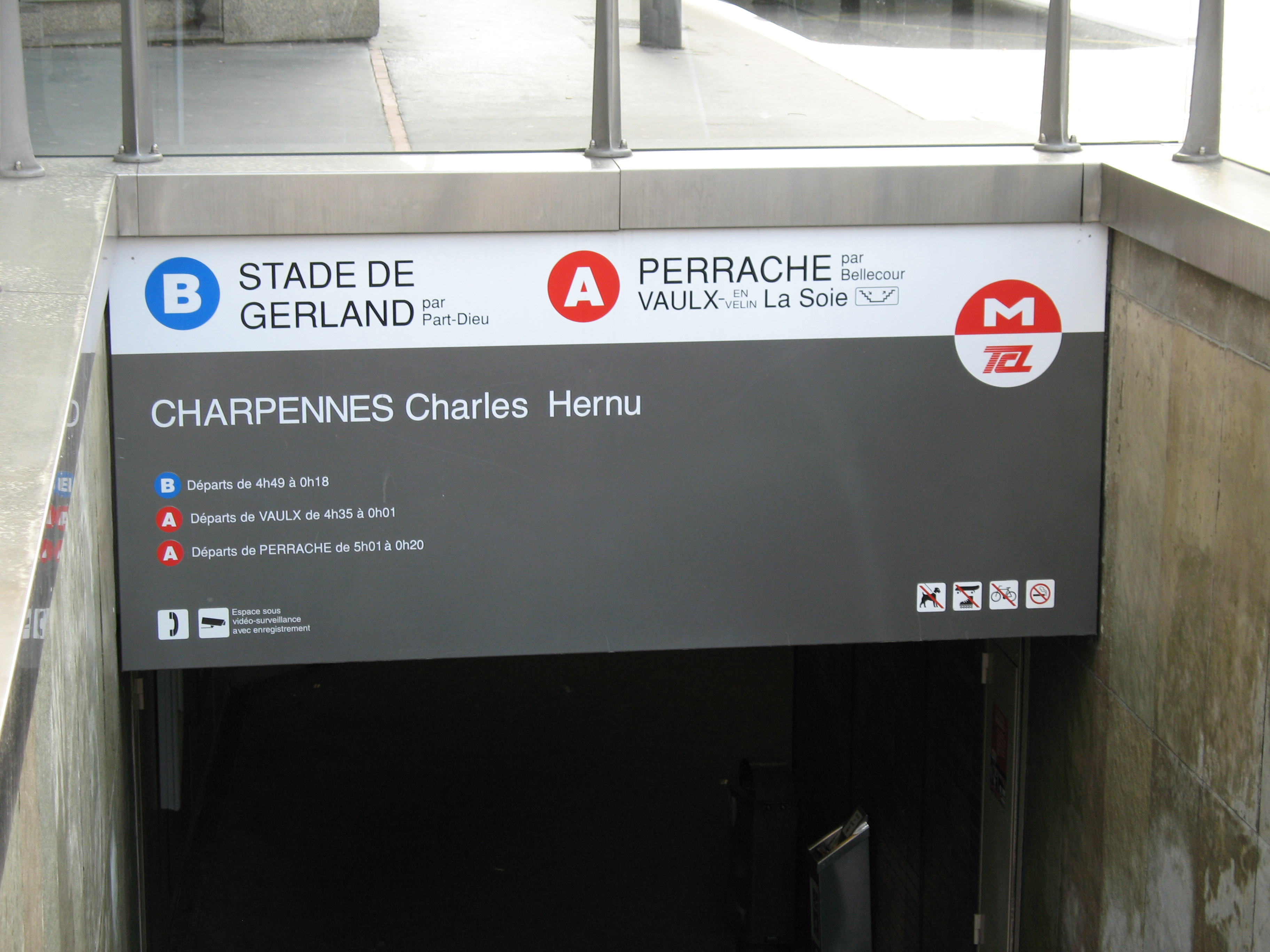 Entrée du métro Charpennes Charles Hernu sur le réseau TCL à Lyon.